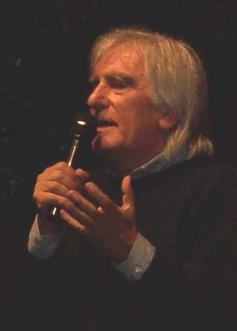 Foto concessa a voce a Jacobus dall'ex direttore del coro della Brigata Julia